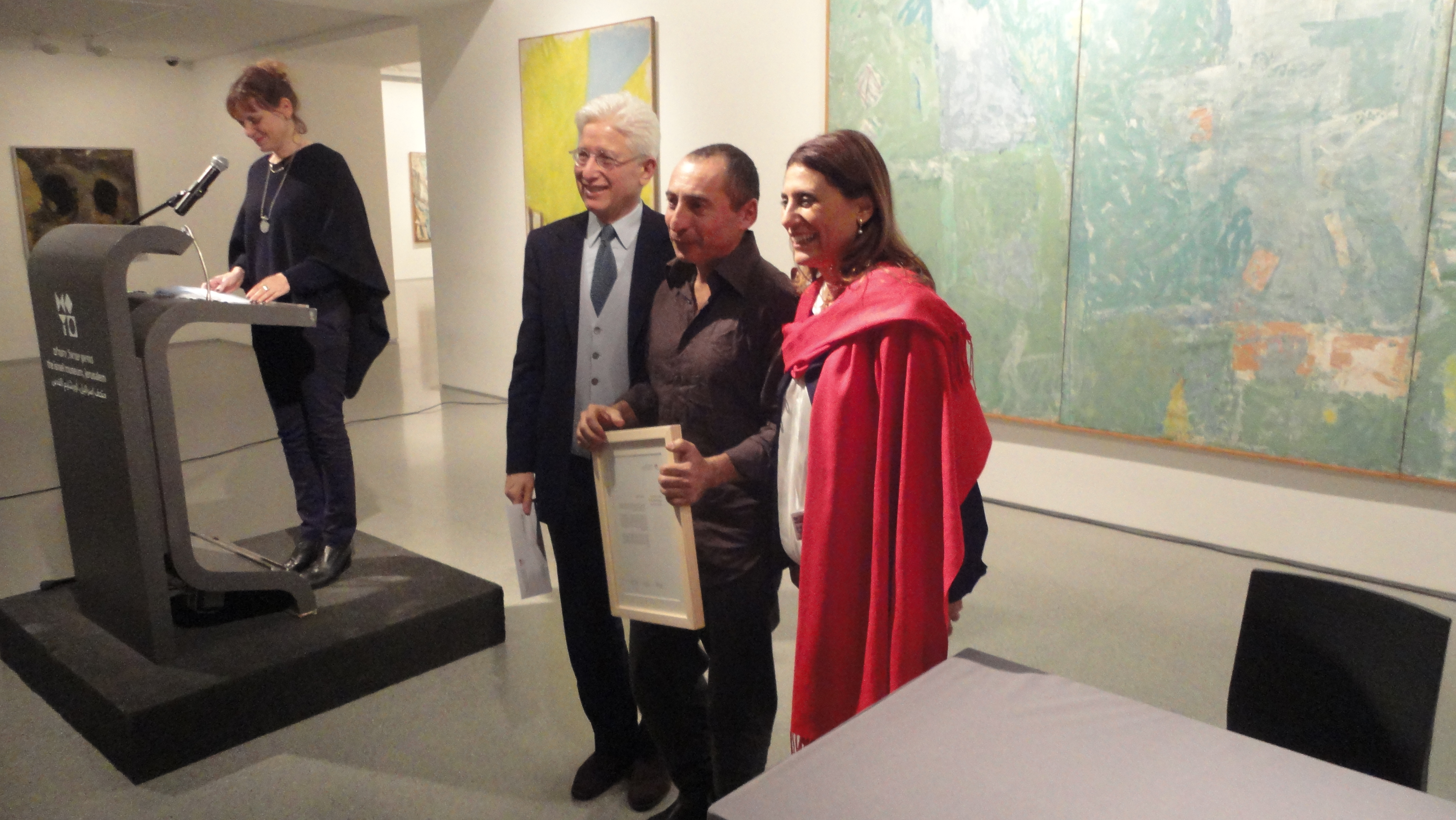 אלכס קרמר מקבל את פרס פינס